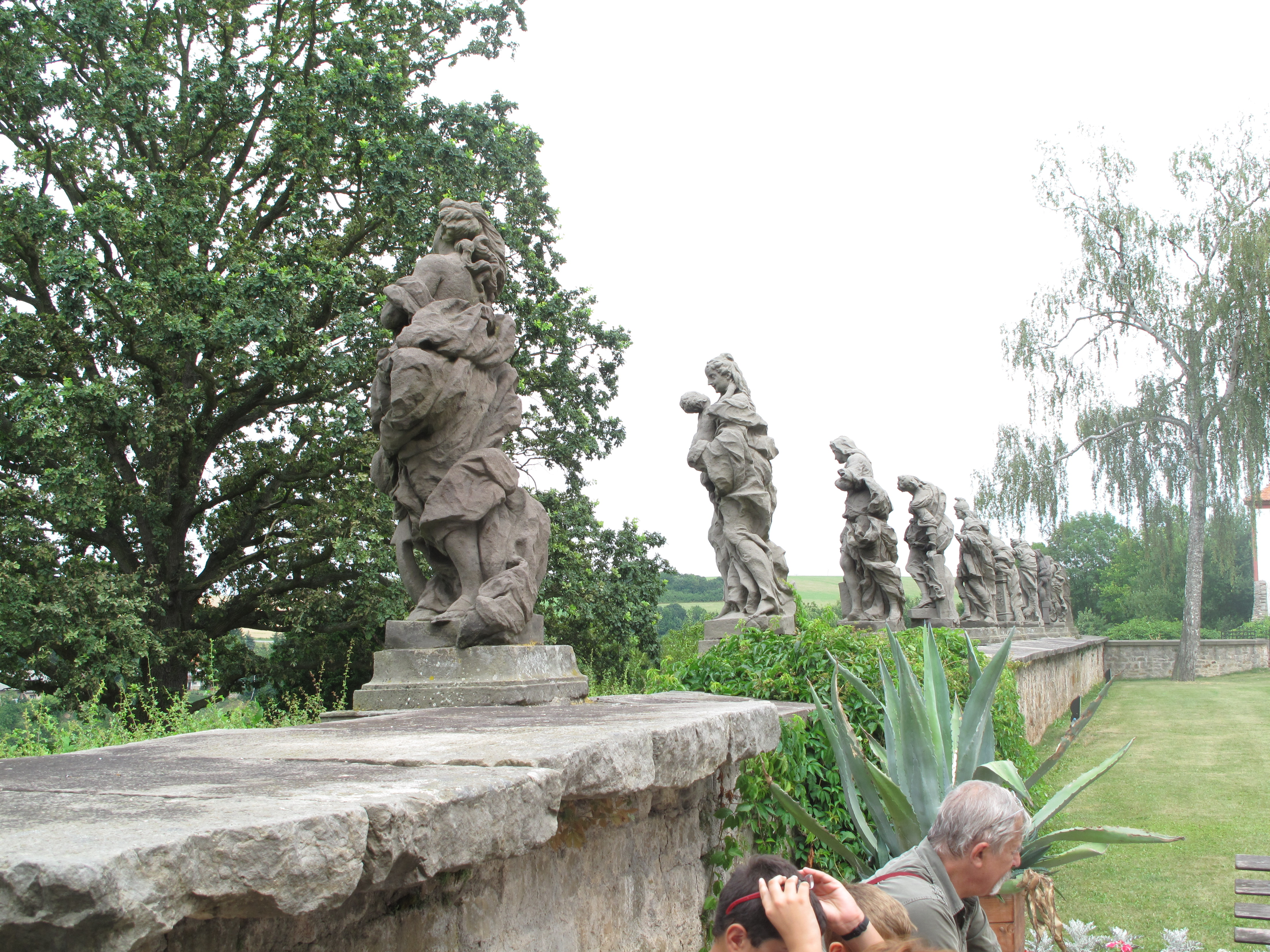 Venkovní kopie ctností na Kuksu